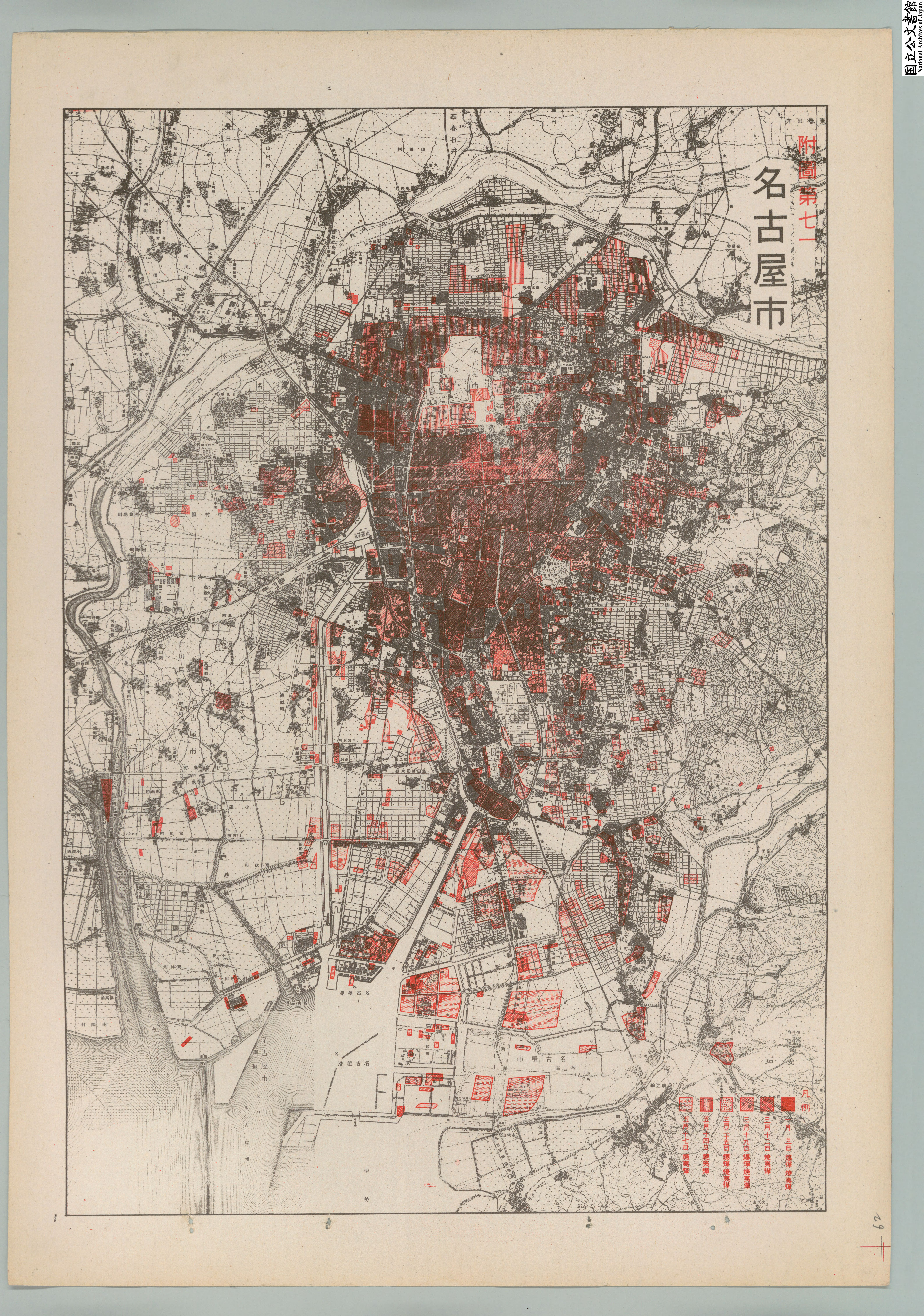 名古屋 行政文書＊内閣・総理府太政官・内閣関係諸雑公文書〔諸雑公文書（その他）〕防空関係資料・全国主要都市戦災概況図・昭和二十年十二月・第一復員省資料課 （国立公文書館デジタルアーカイブ）